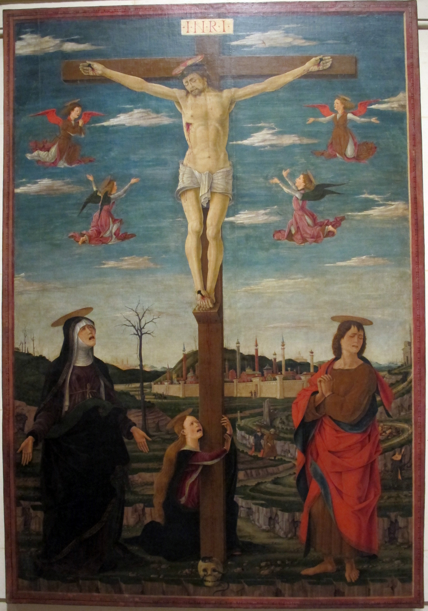 Crocifissione, da s. Antonio a Ferrara